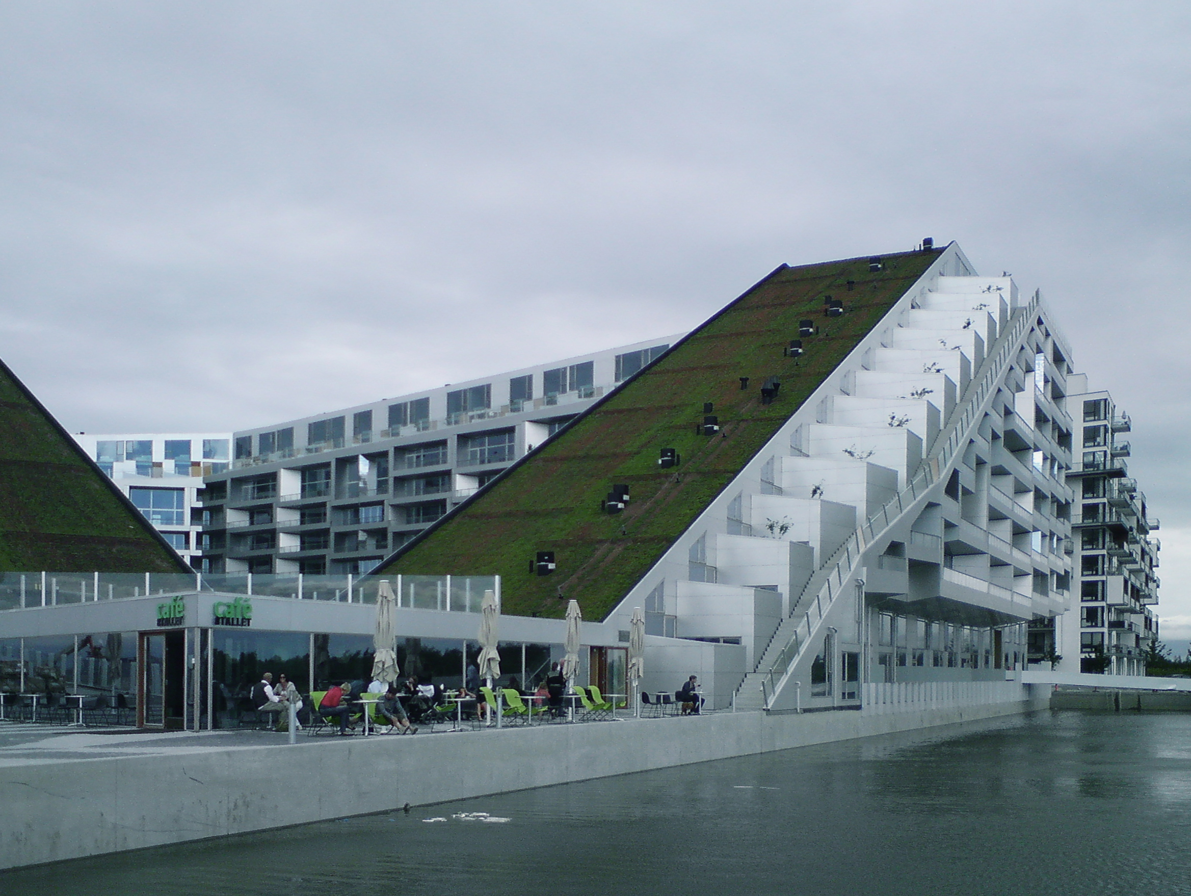 8 House in Ørestad in Copenhagen, Denmark. Architects: Bjarke Ingels Group